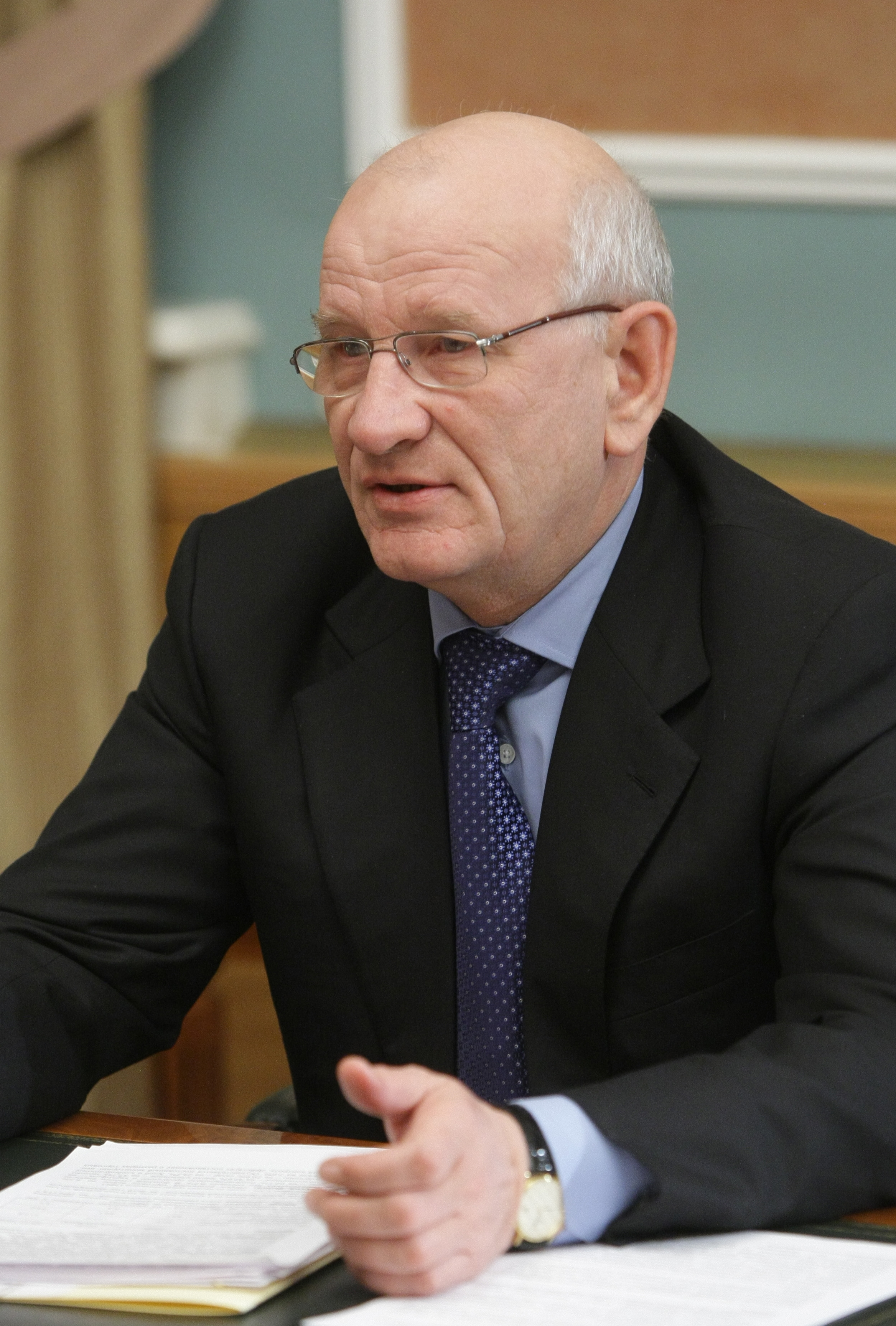 Губернатор Оренбургской области Ю. А. Берг на встрече с Председателем Правительства Российской Федерации В. В. Путиным